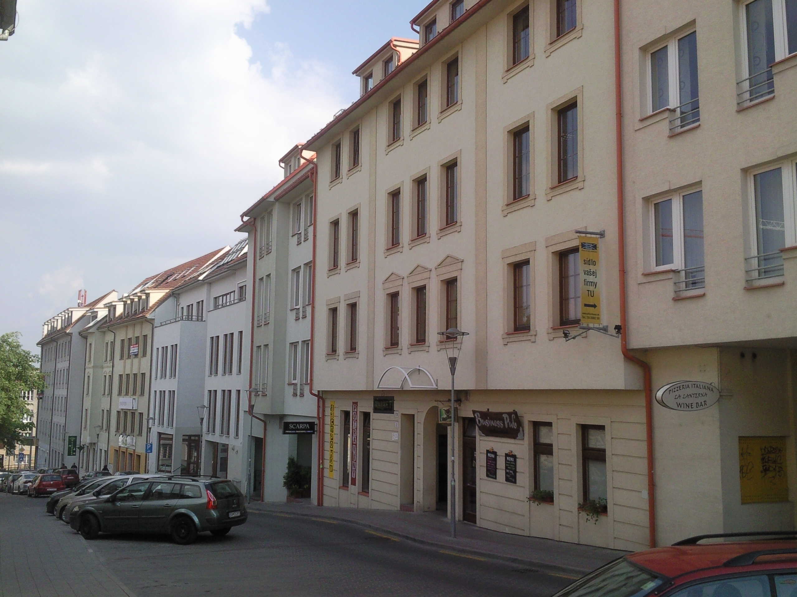 Zámocká, Bratislava